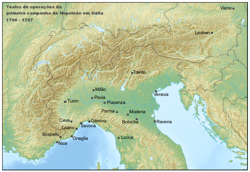 Teatro de operações em que se desenrolaram os principais acontecimentos da primeira campanha de Napoleão em Itália.